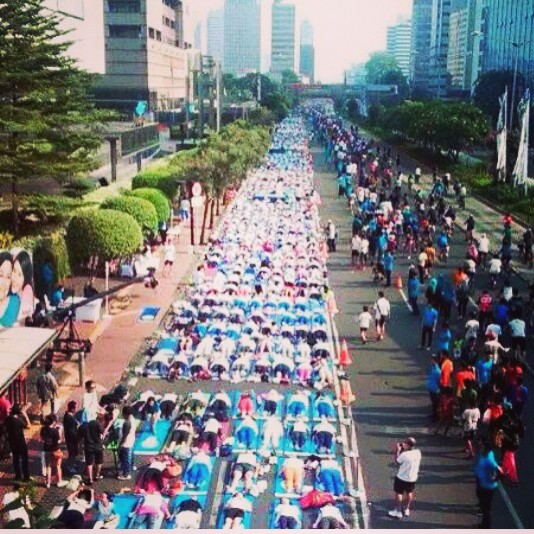 people are doing yoga in jakarta